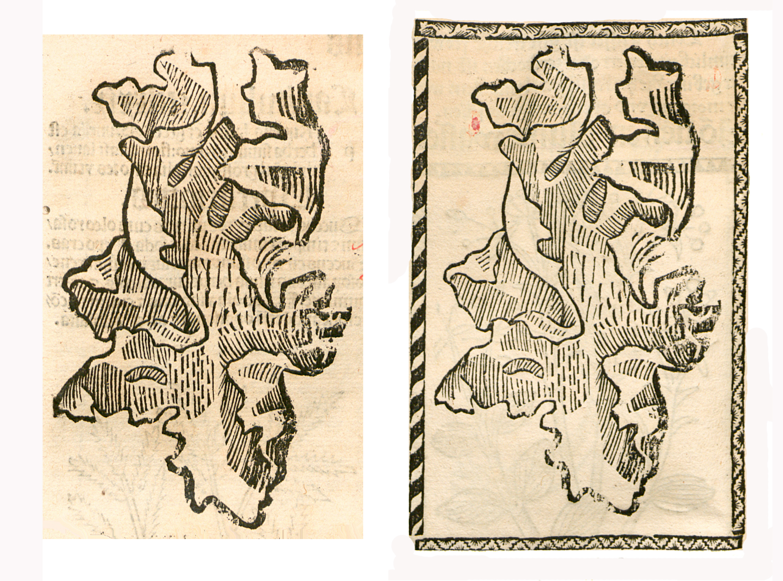 Abbildung von: Leber krut (Marchantia polymorpha)